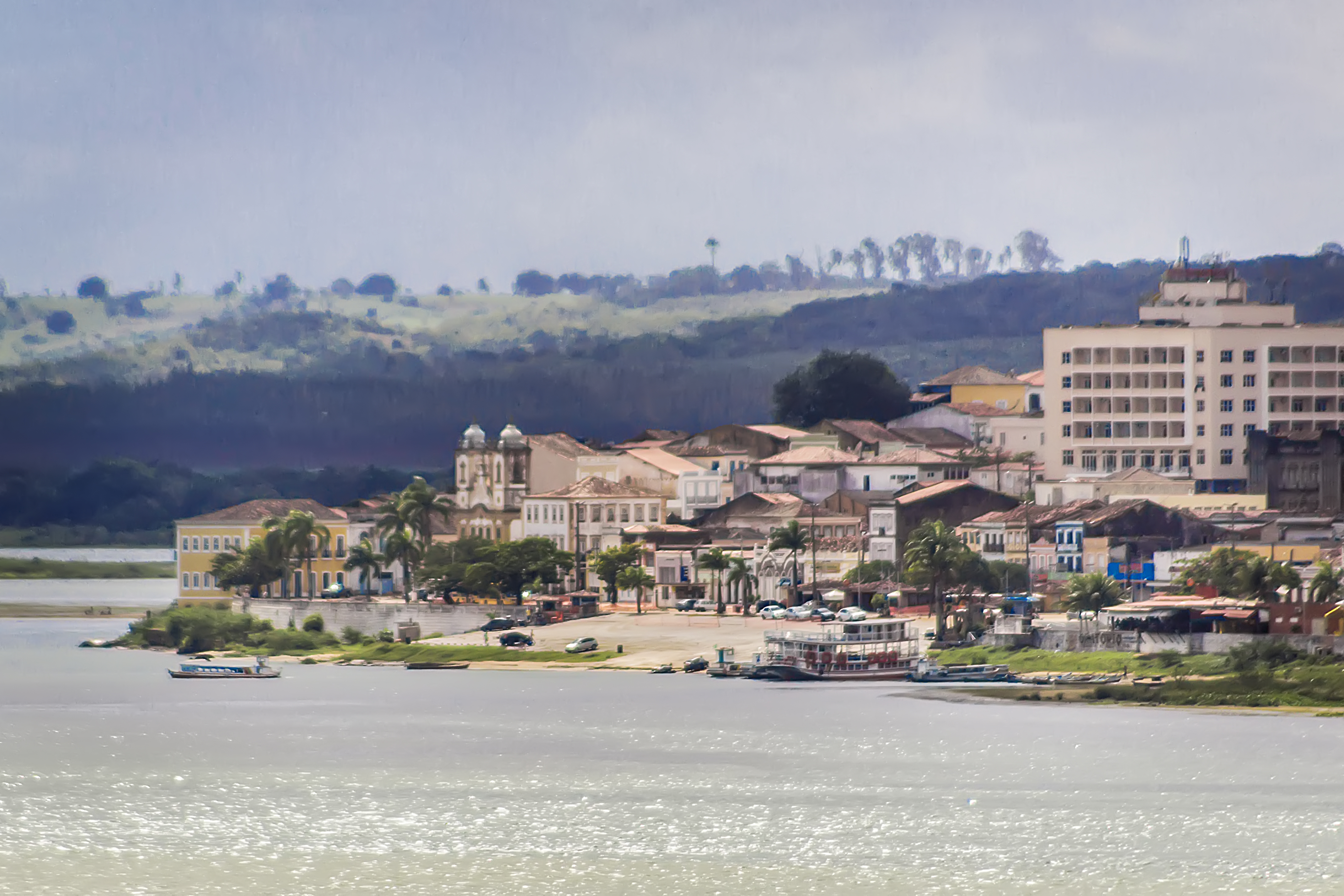 Penedo, AL: conjunto arquitetônico, paisagístico e urbanístico